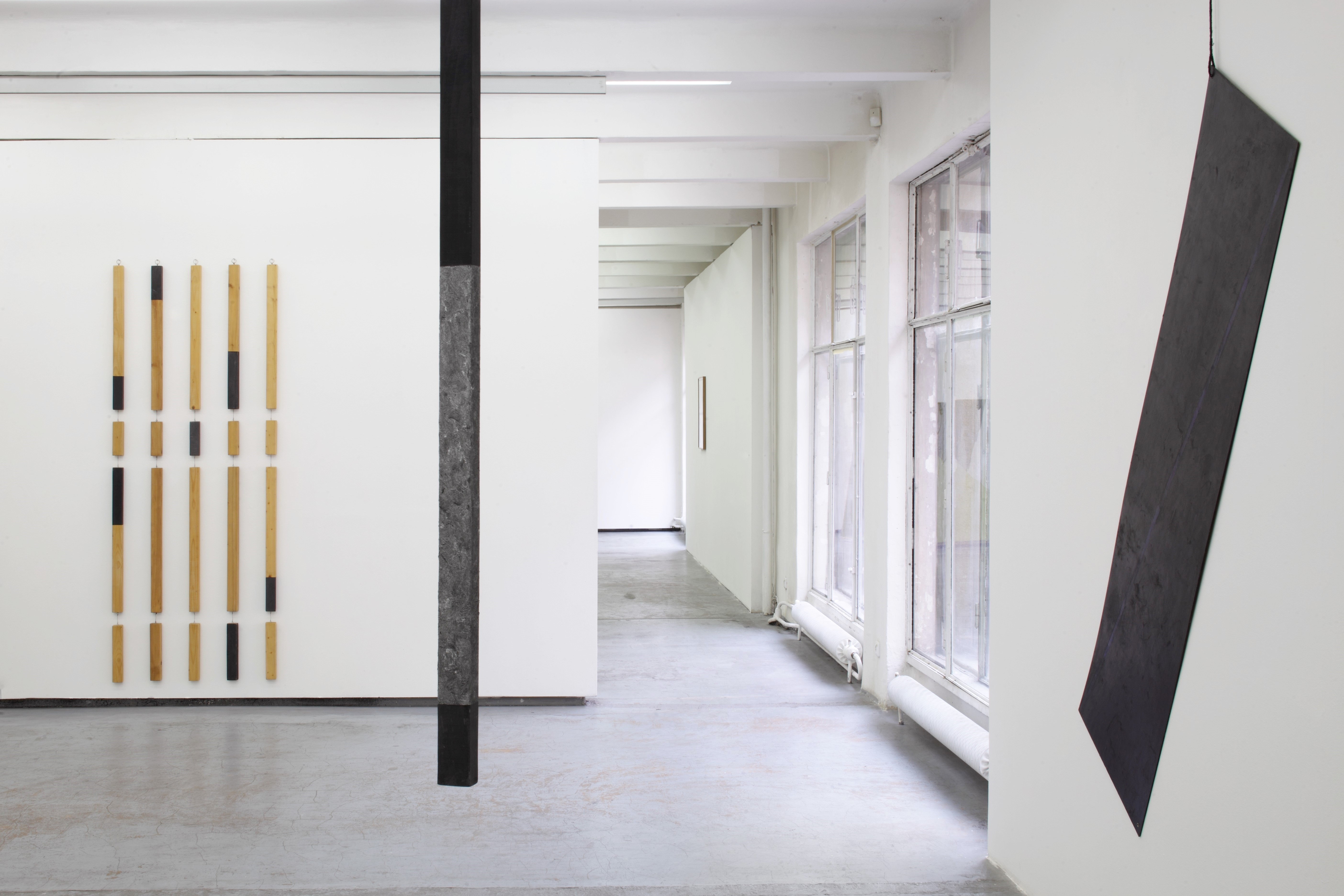 Jan Kotík, Posiible Variation, 2011, Prague (Biskupský dvůr)